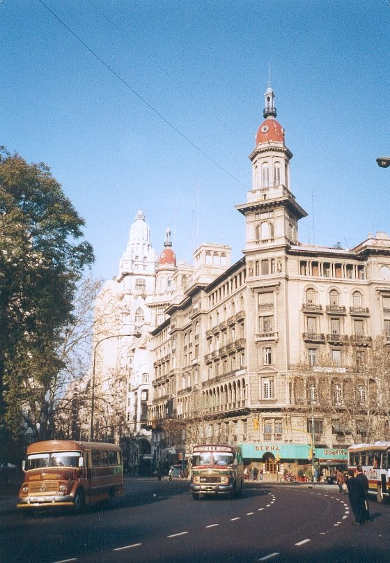 Auteur : Georgio lieu: Centre-ville de Buenos Aires - 1992